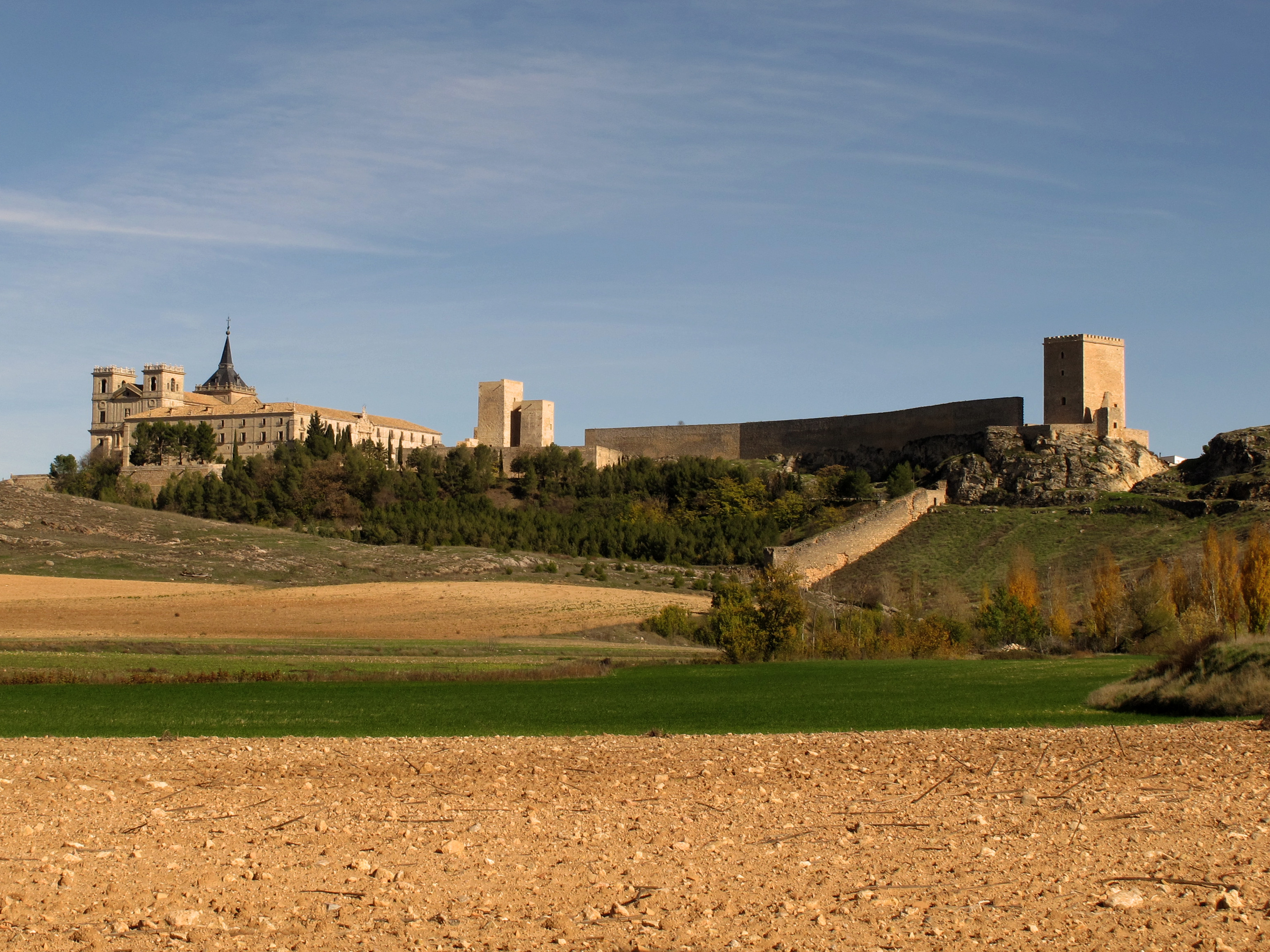 Uclés, provincia de Cuenca, España.